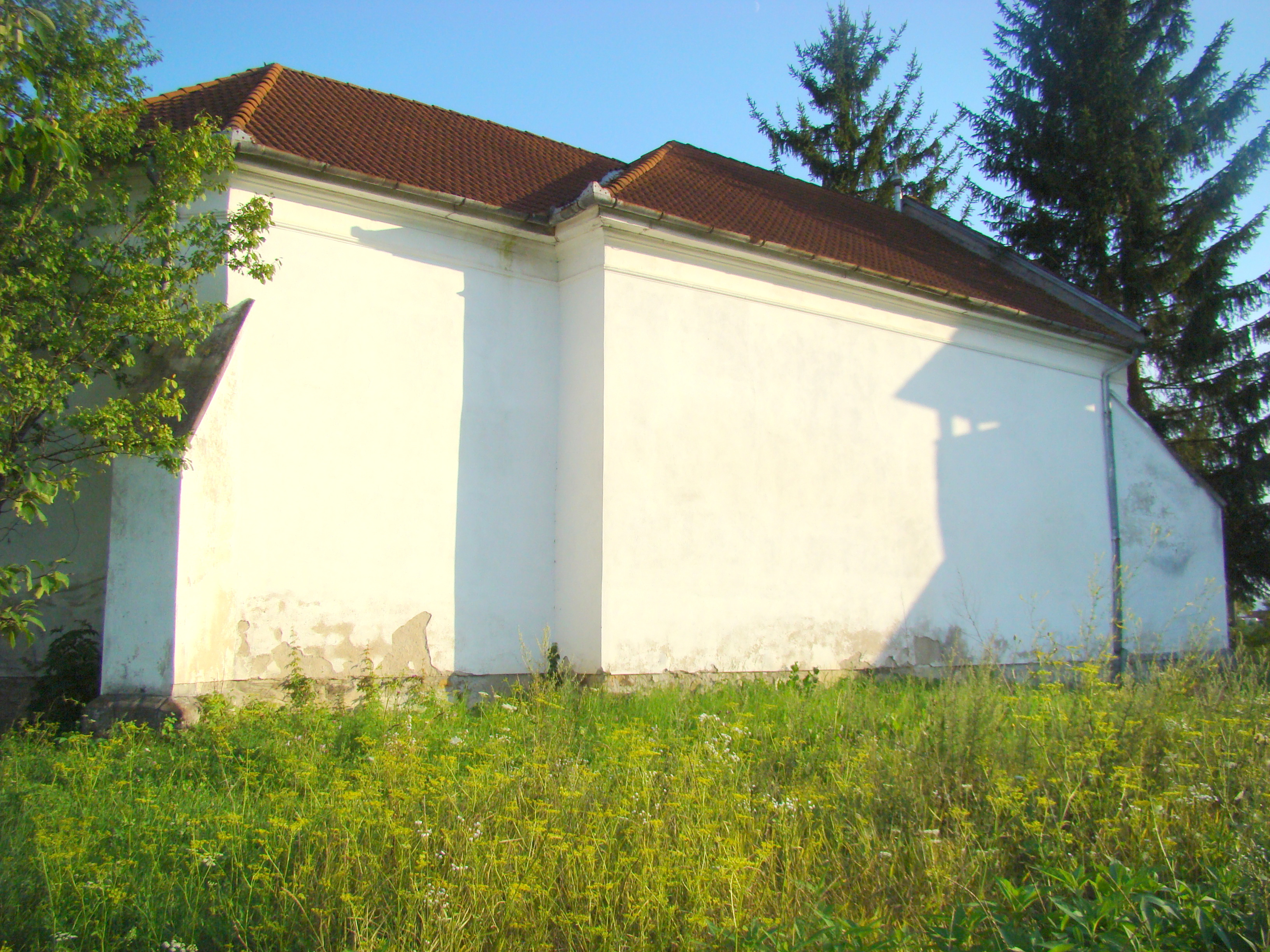 Biserica reformată din satul Zimbor; comuna Zimbor, județul Sălaj 01